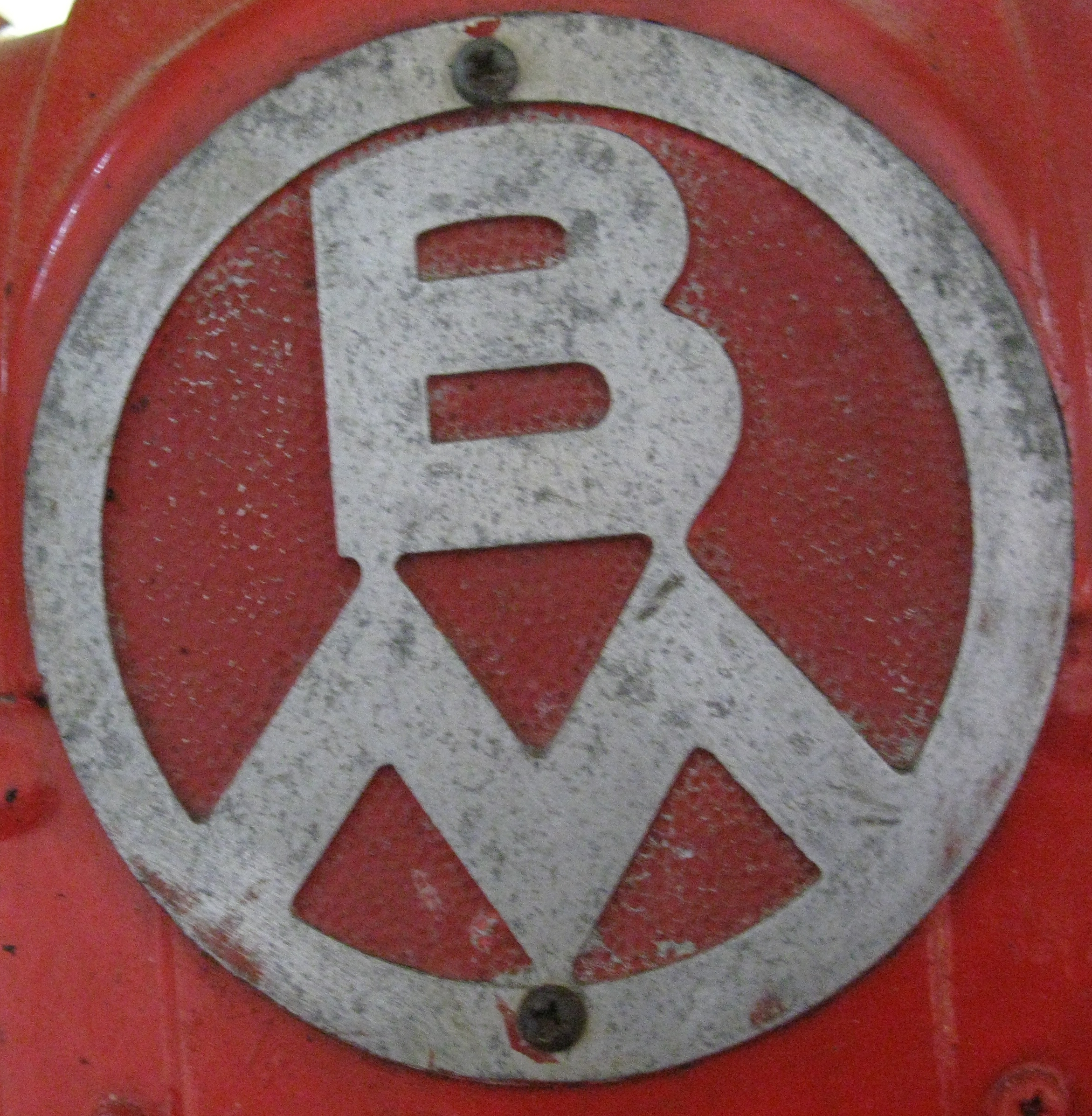 Logo Bolinder-Munktell photographié sur la calandre d'un BM 350.